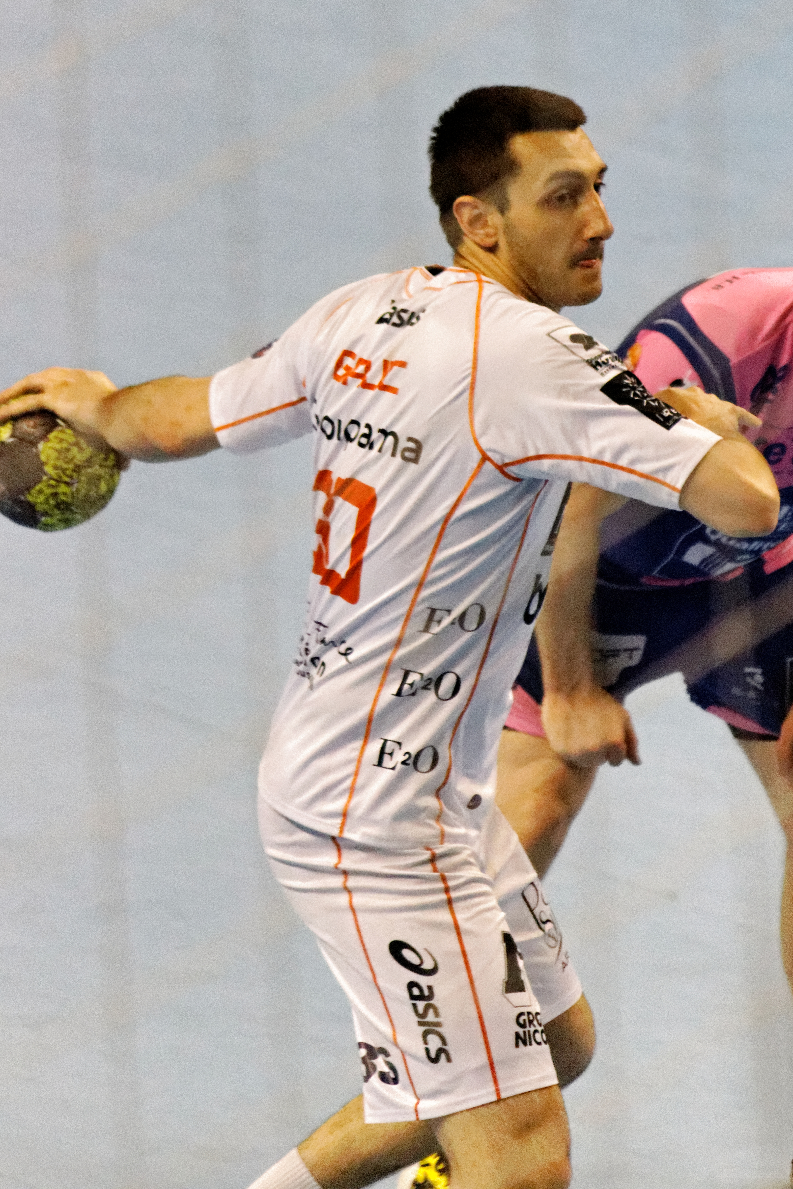 Dragan Gajić lors du match Cesson-Rennes MHB contre Montpellier AH, le 12 mai 2012.